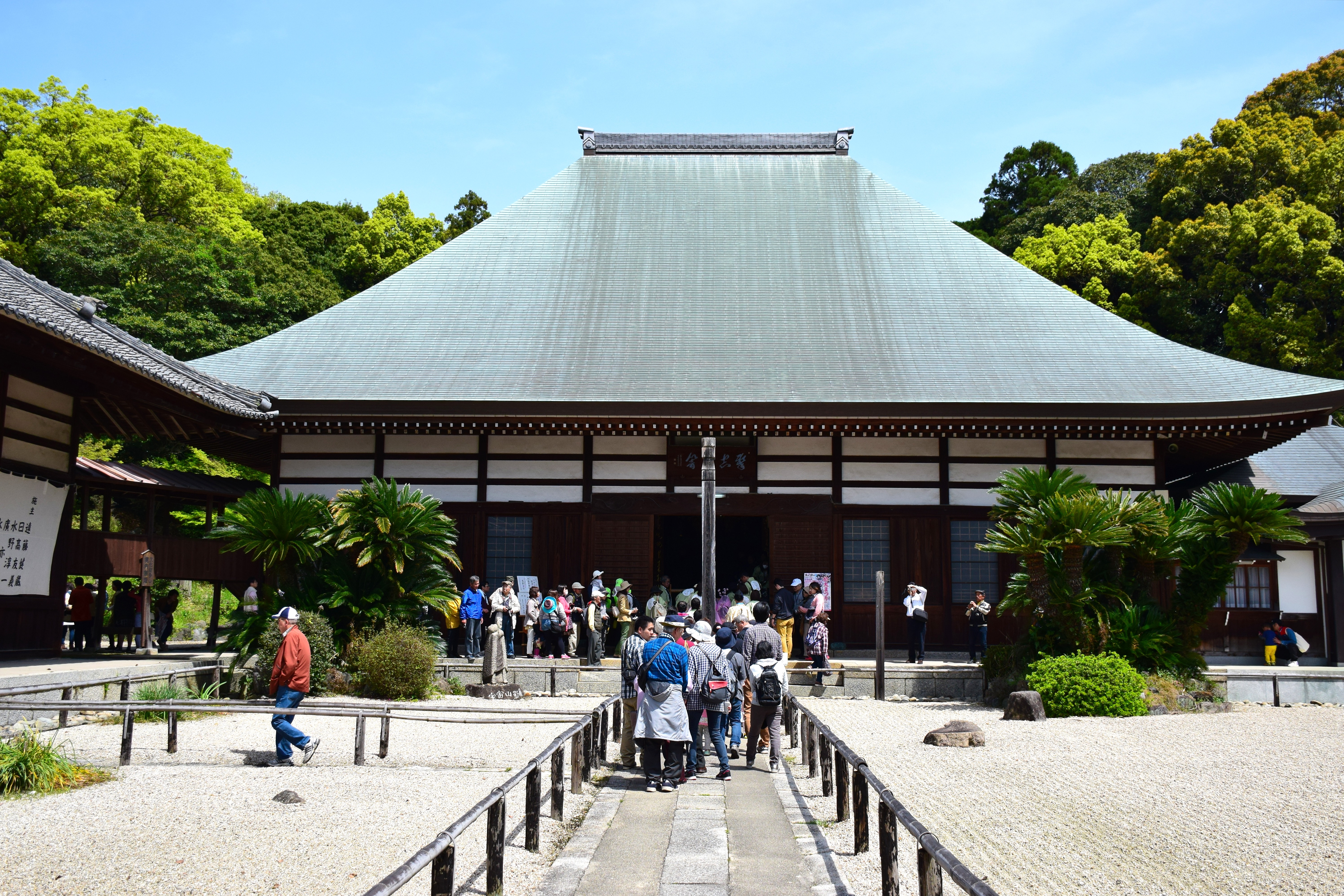 乾坤院本堂